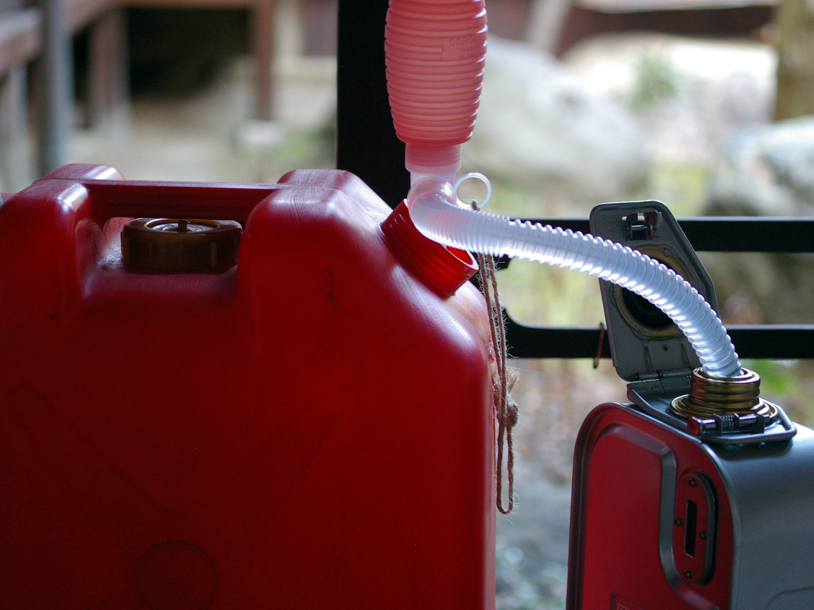 一般に写真を撮る人は、形を変えるものや消えてしまう光景に敏感になります。 世界のありとあらゆるものは、いつか形を変え消えてしまいます。 つまり写真を撮る人は世界に対して敏感になります。